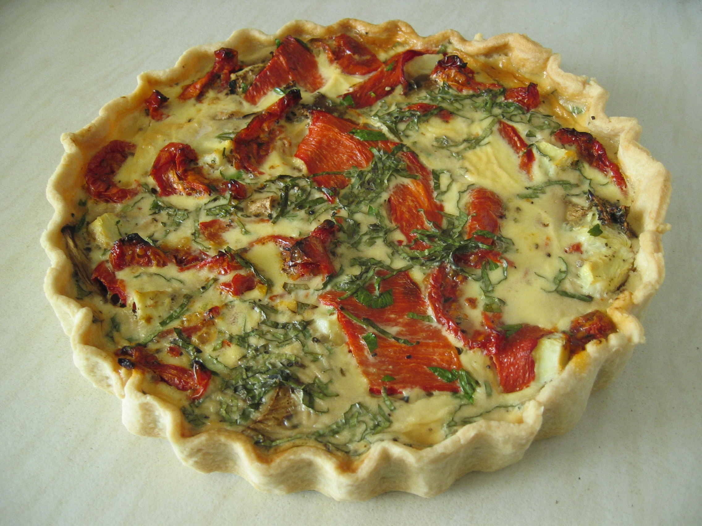 Home made quiche.